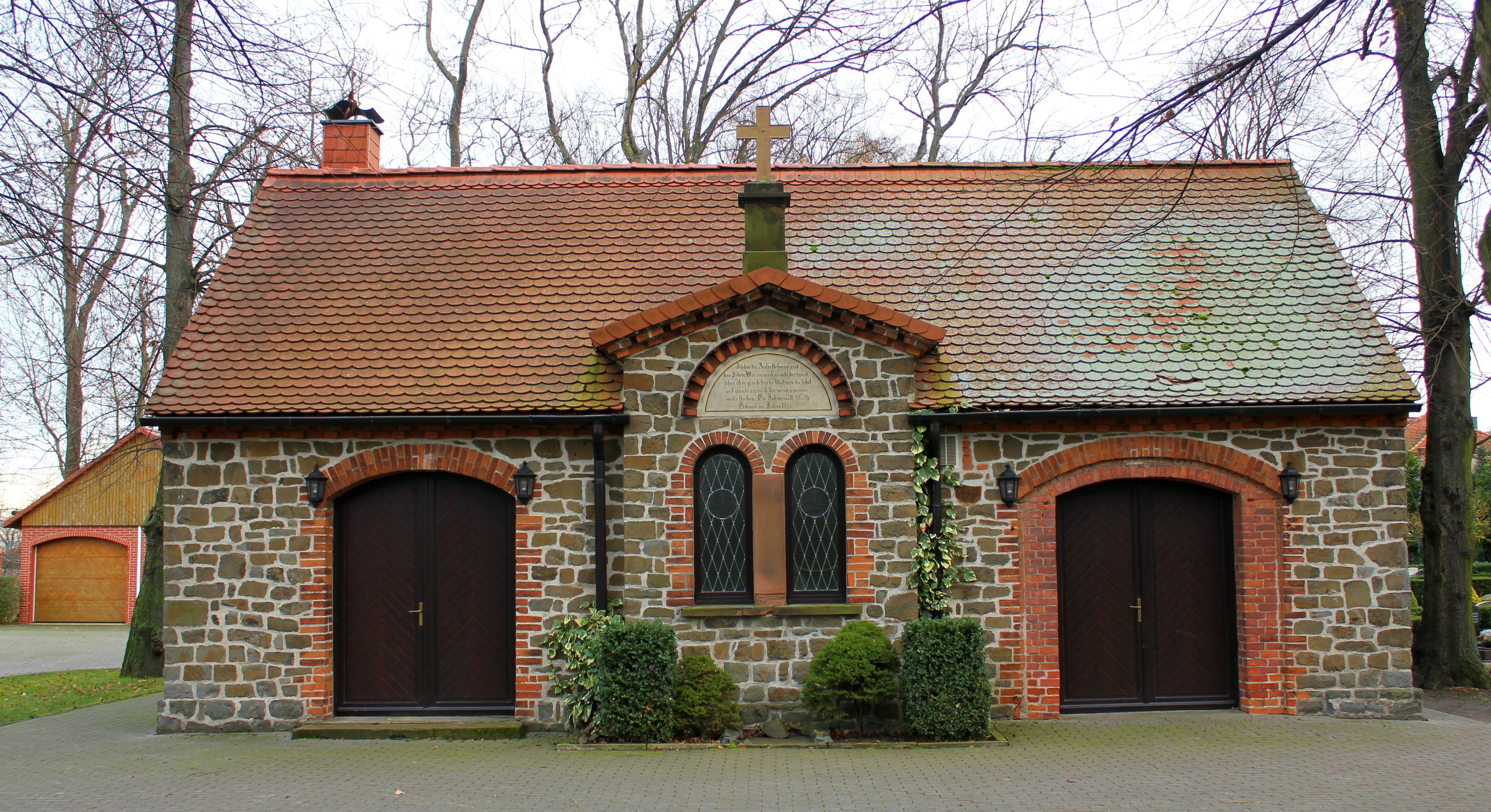 Neuer Friedhof Breiteweg, Barleben